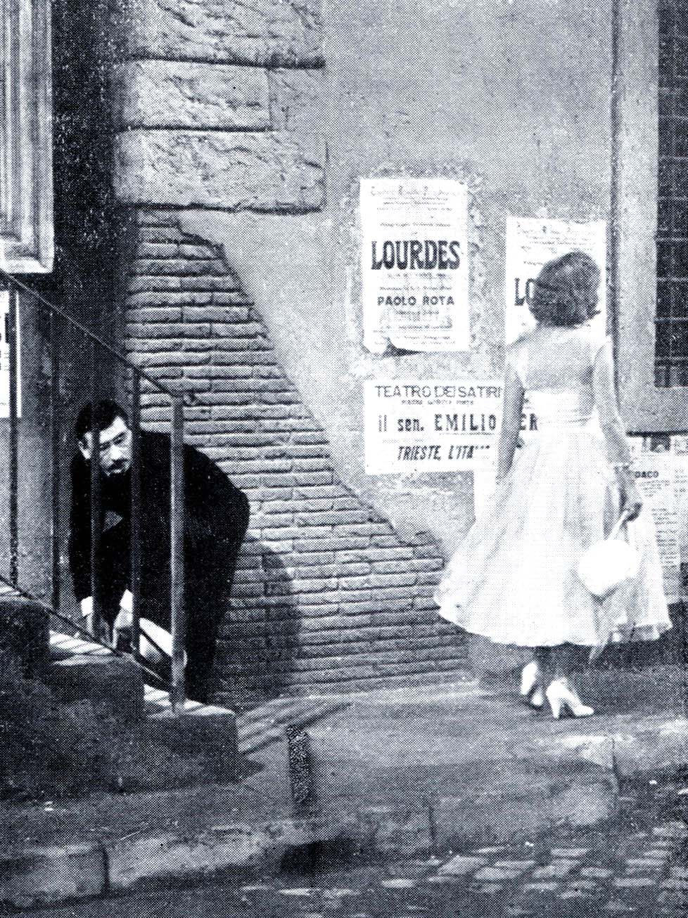 Renato Rascel incontra Lisa ne "La passeggiata" film da lui diretto ed interpretato nel 1953